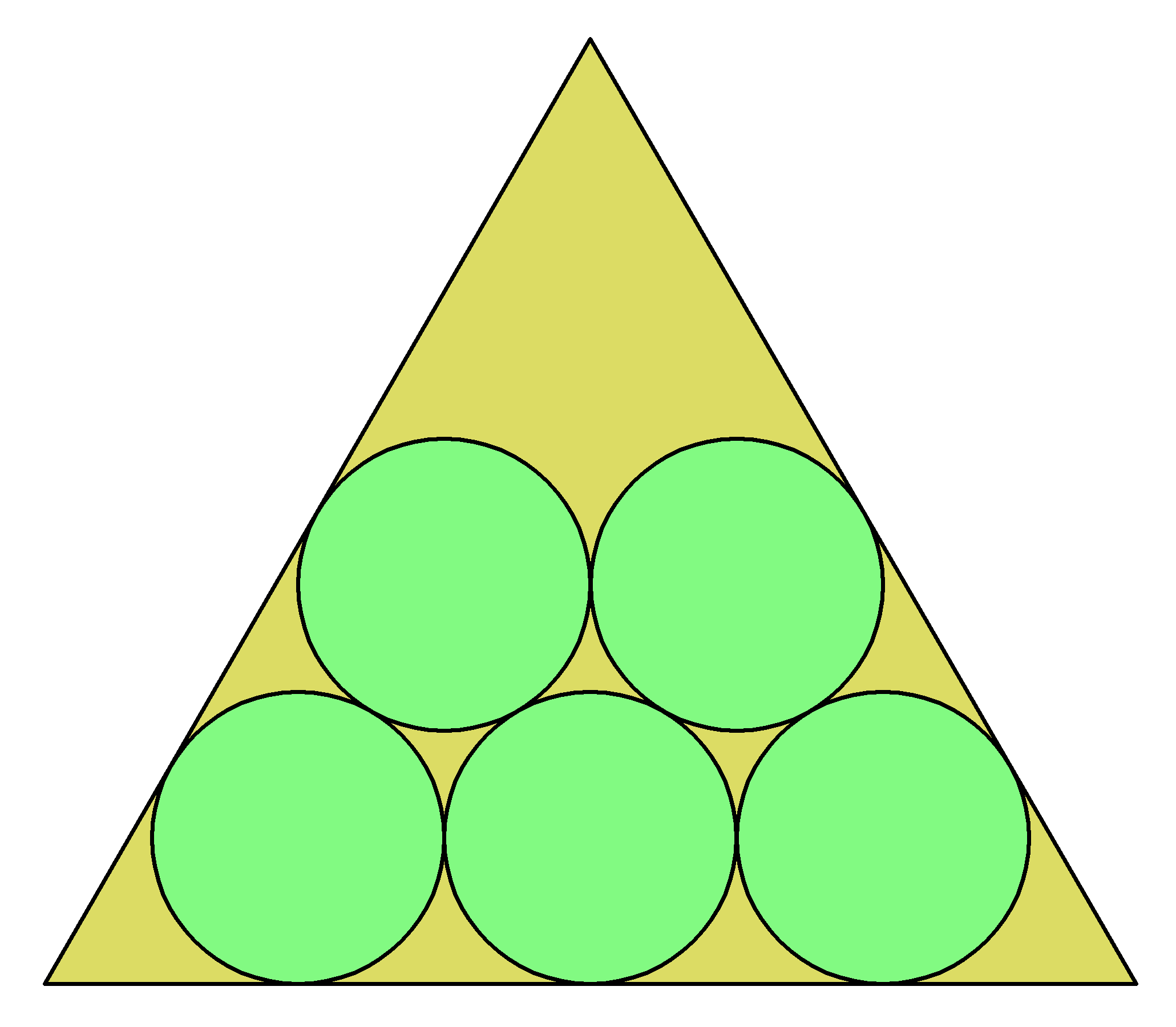 5 cirkloj en 60 60 60 triangulo, varianto 1